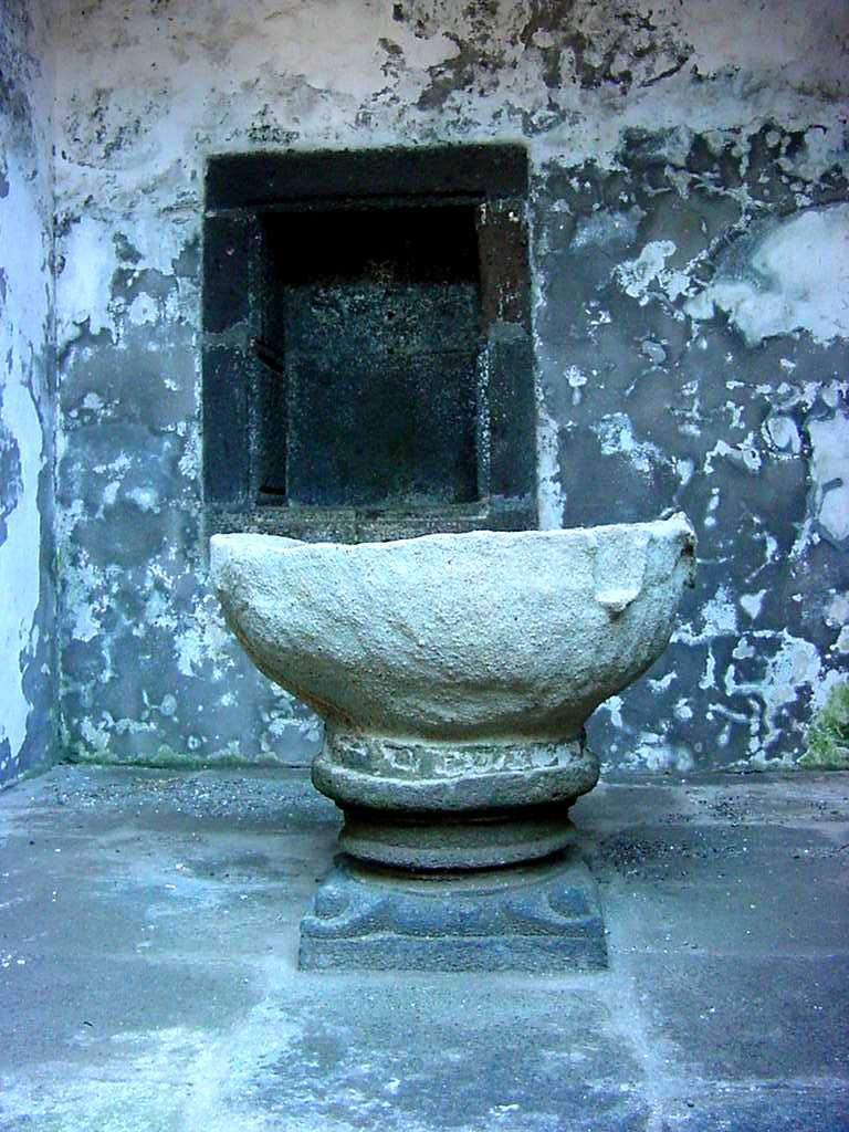 Pia Baptismal da Igreja Velha de São Mateus da Calheta destruída por um temporal, ilha Terceira, Açores, Portugal.